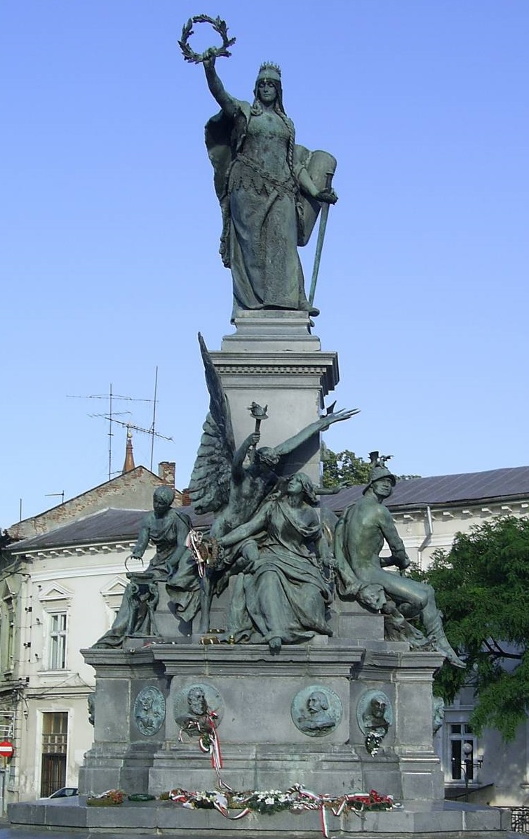 Hungária nőalak Aradon